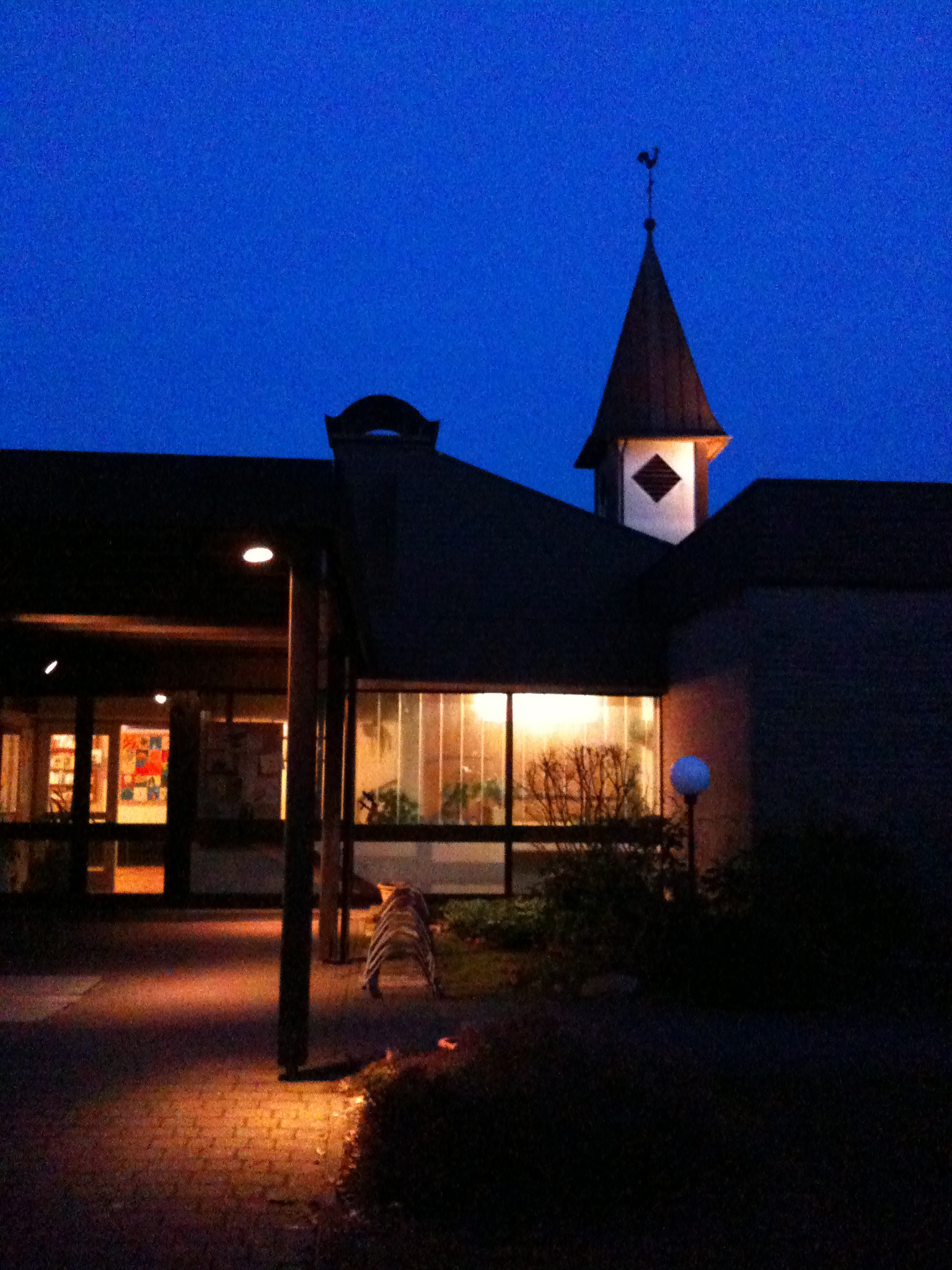 Nachtaufnahme der Johanneskirche Kachtenhausen